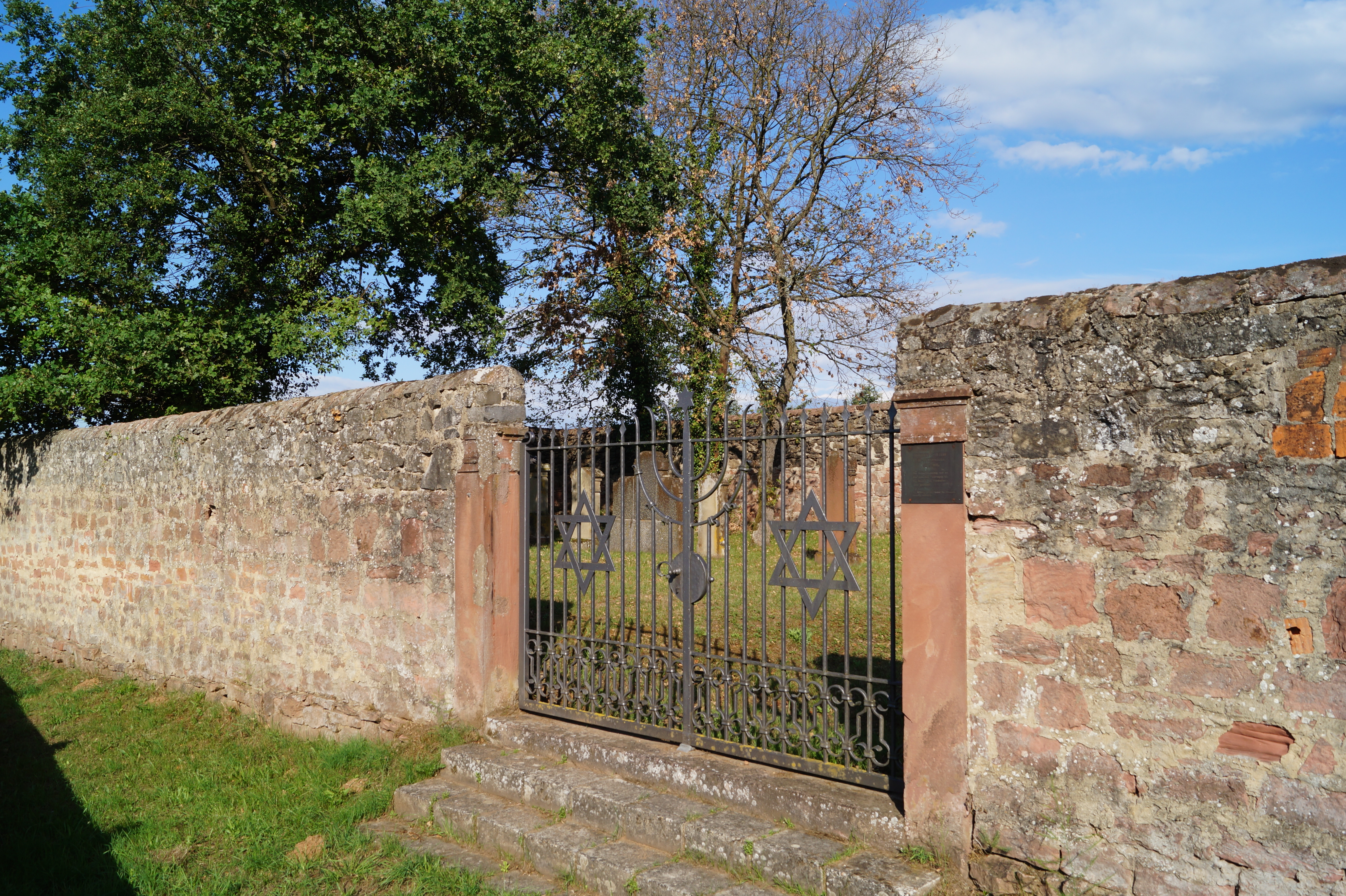 Tor des Jüdischen Friedhofs in Klein-Krotzenburg, Gemeinde Hainburg in Hessen, Ansicht von Südwesten.